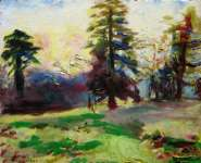 Cyprés au couchant